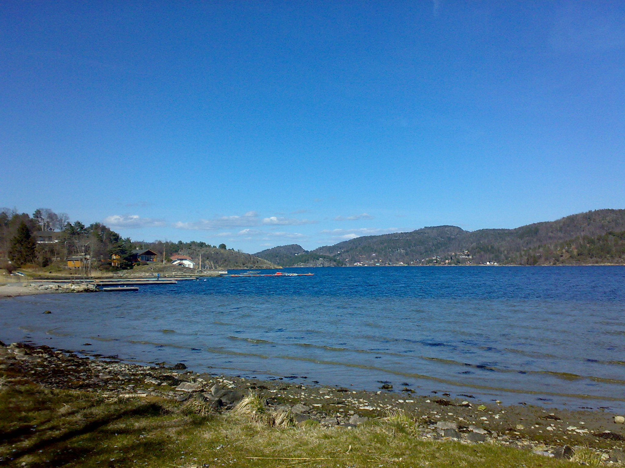 Skjelsvik, Porsgrunn, Norway